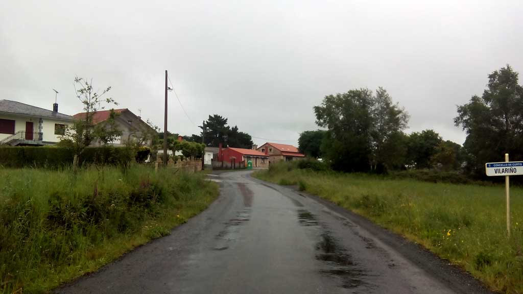 Vista de Vilariño, Curtis.